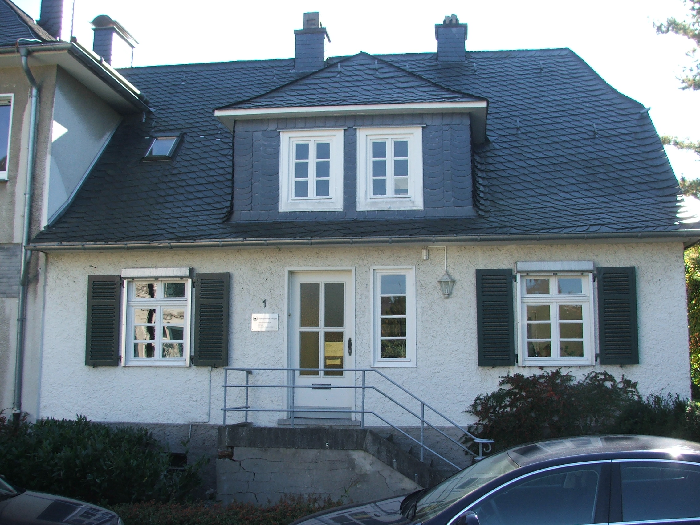 Fernuni Hagen, Aussenstelle in Brilon